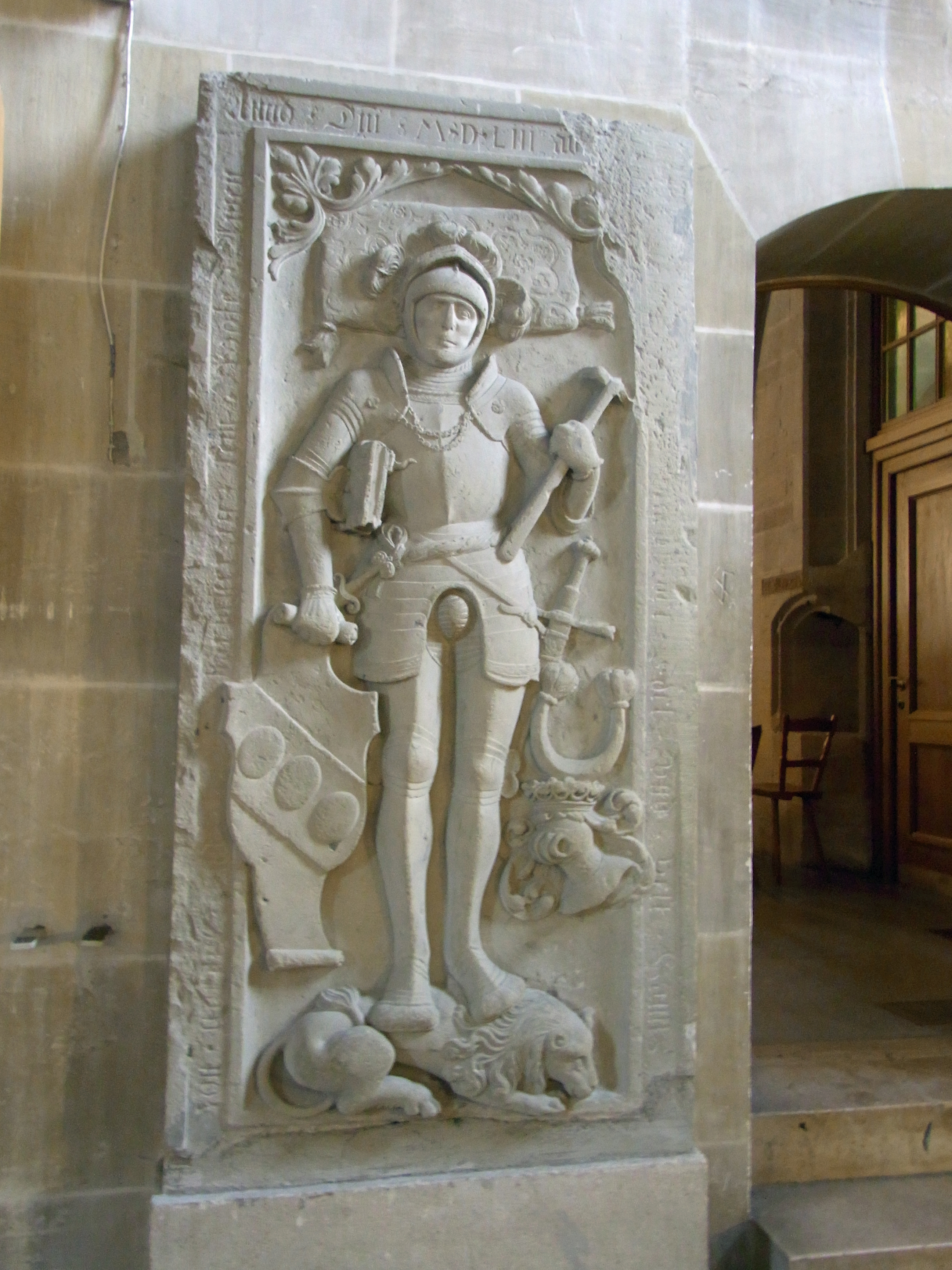 Stiftskirche St. Georg, Tübingen, Epitaph Johann Conrad von Wern(d)au (+1553), der Werkstatt Joseph Schmids zugeschrieben